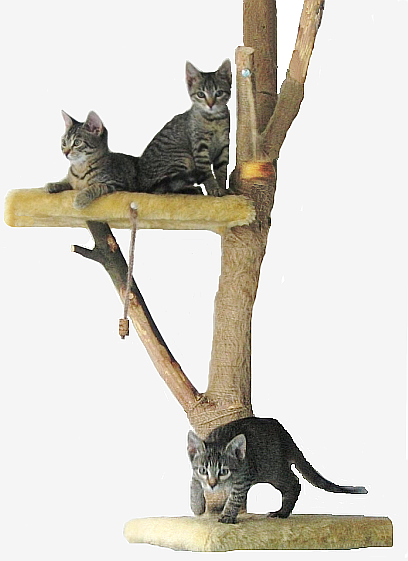 3 mačiatka na škrabadle.